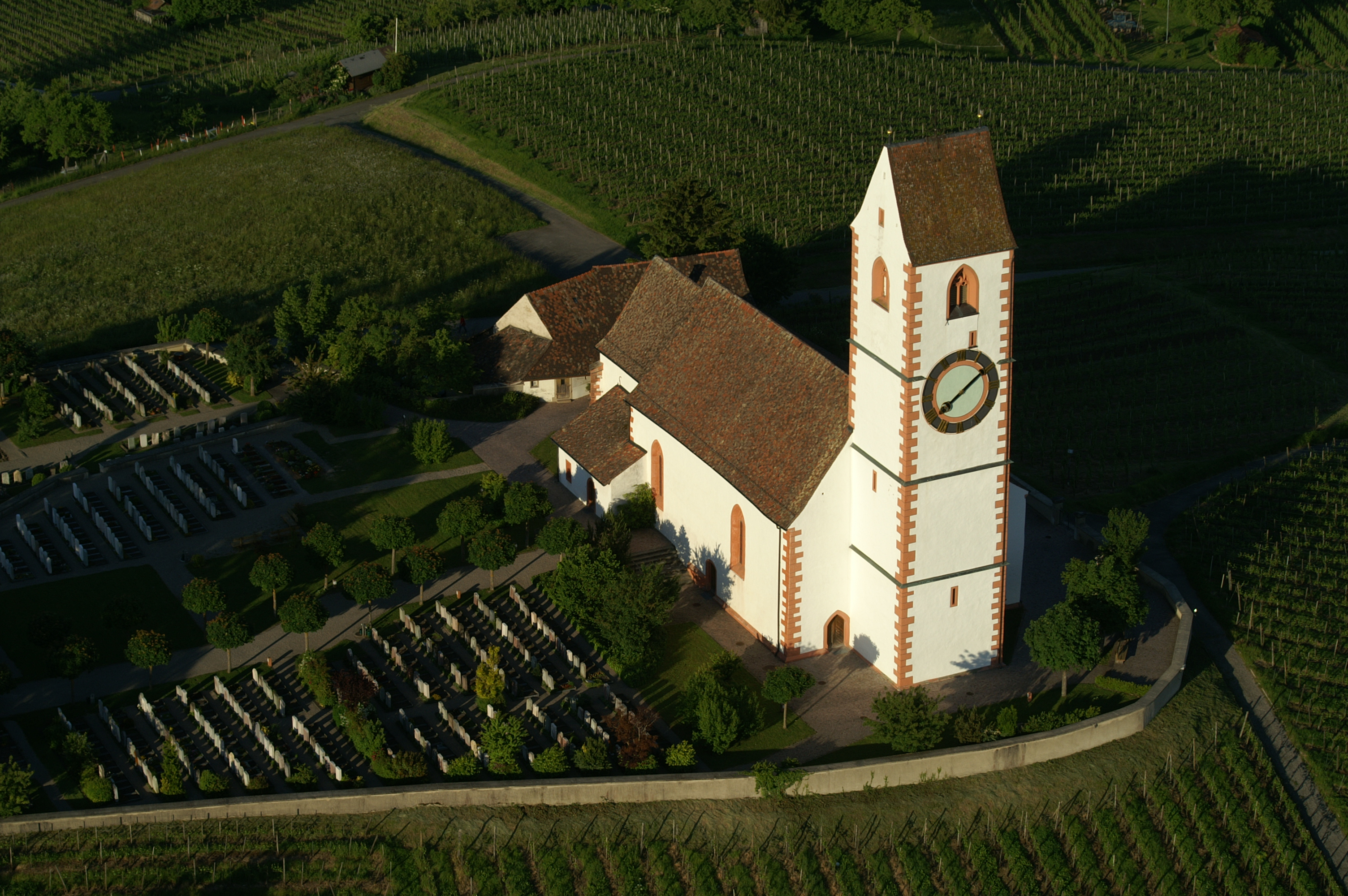 Hallauer Bergkirche Kanton Schaffhausen